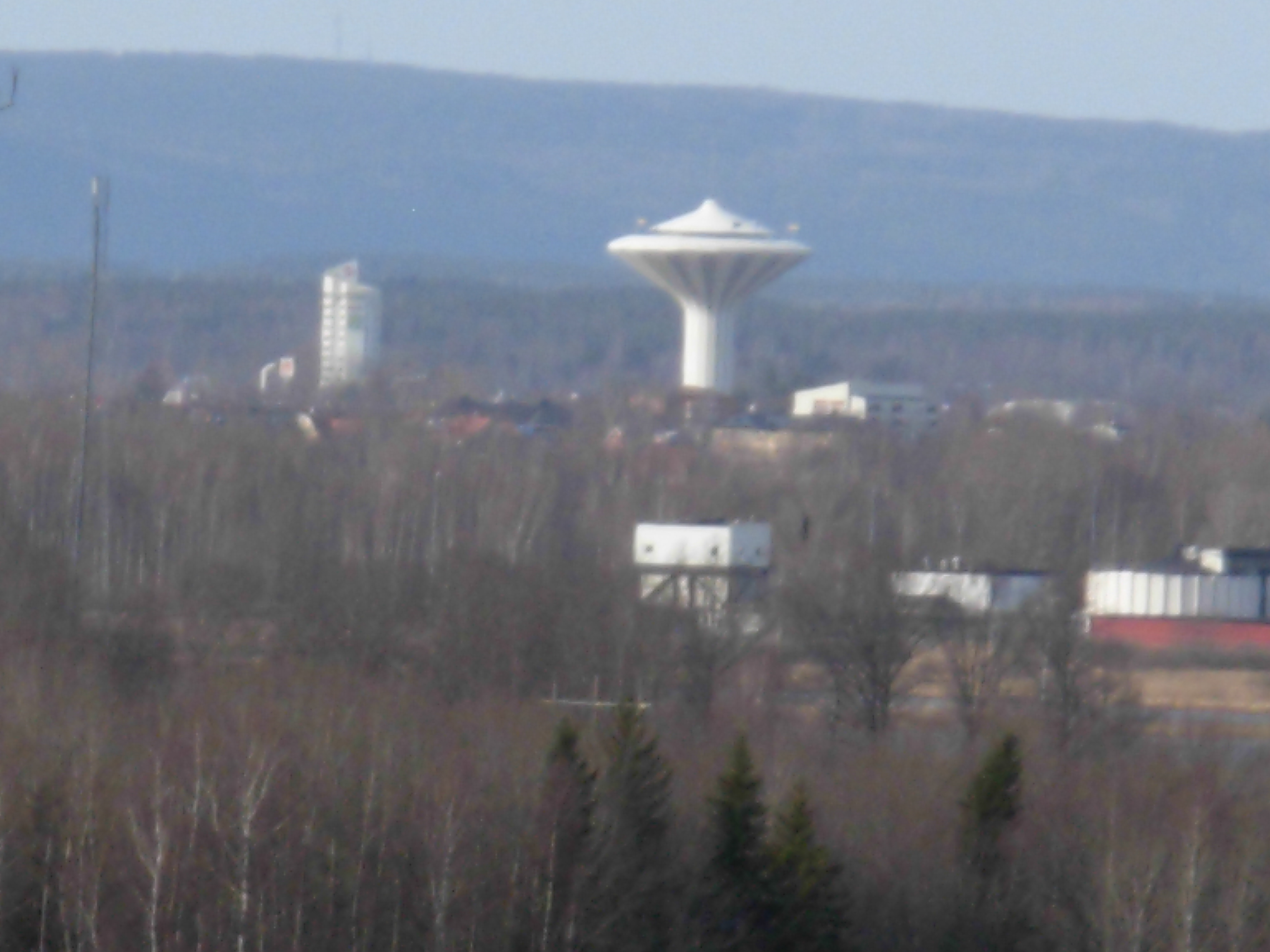 View over Örebro water tower